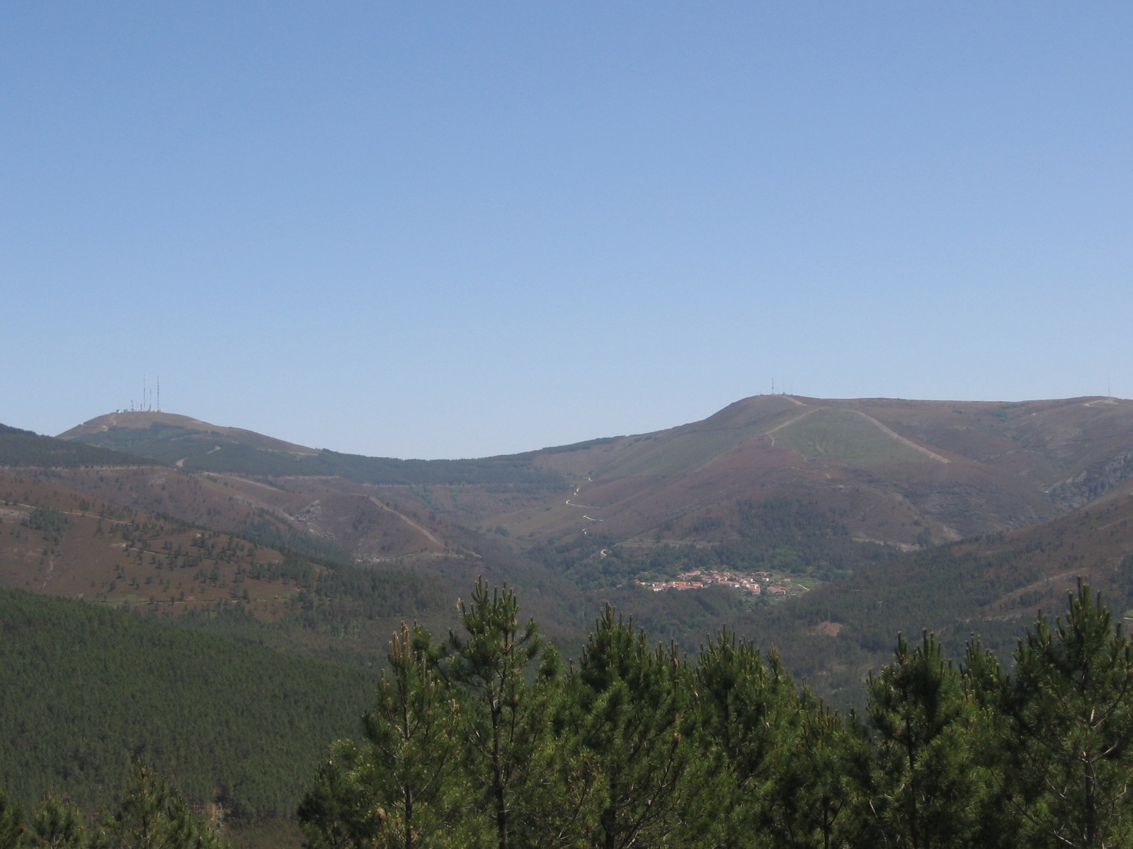 Aldeia de Coentral na vertente sul da serra da Lousã. Portugal